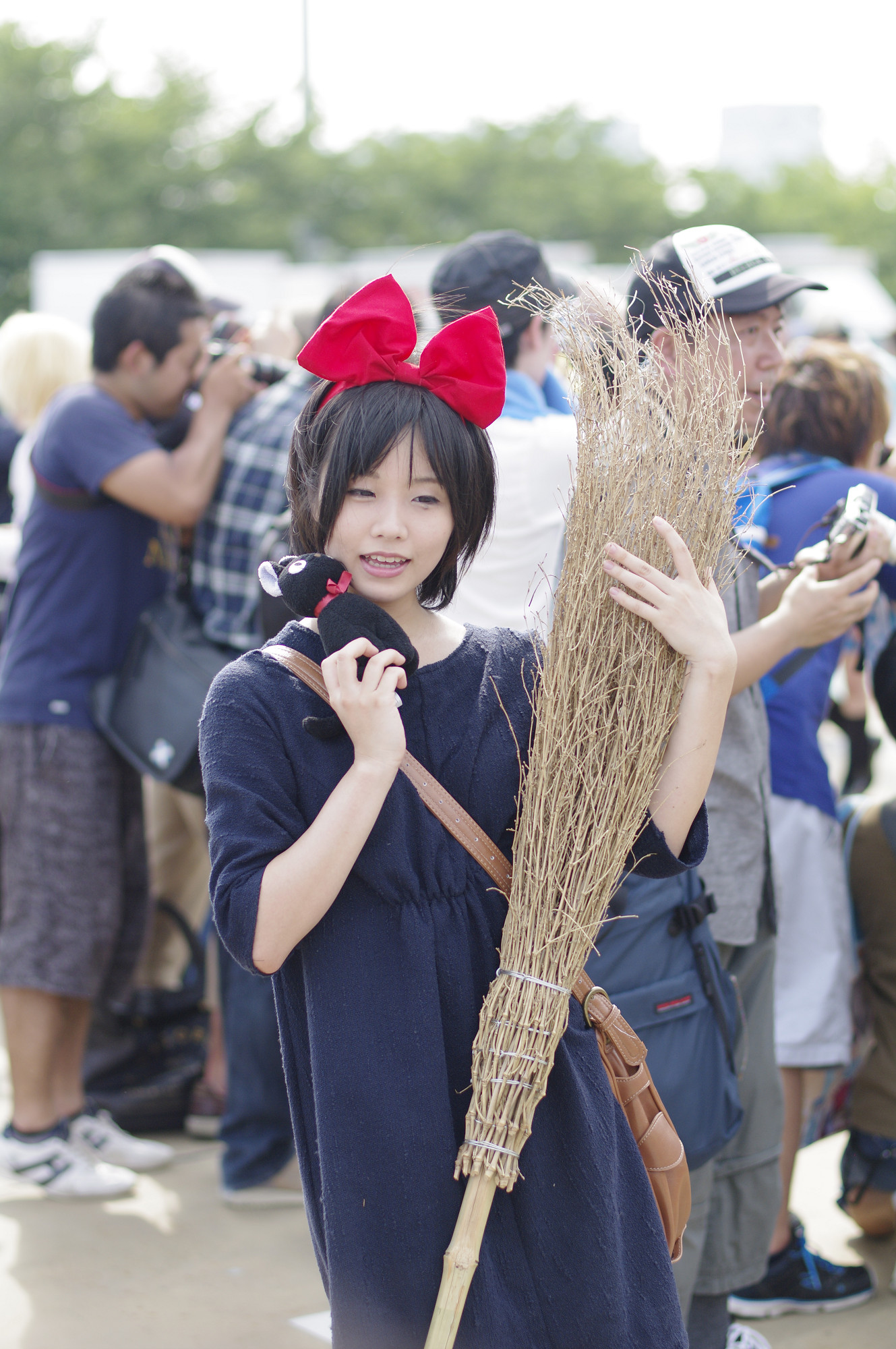 2012年8月10日に行われたコミックマーケット82一日目のキキ（魔女の宅急便）コスのくろねこです。